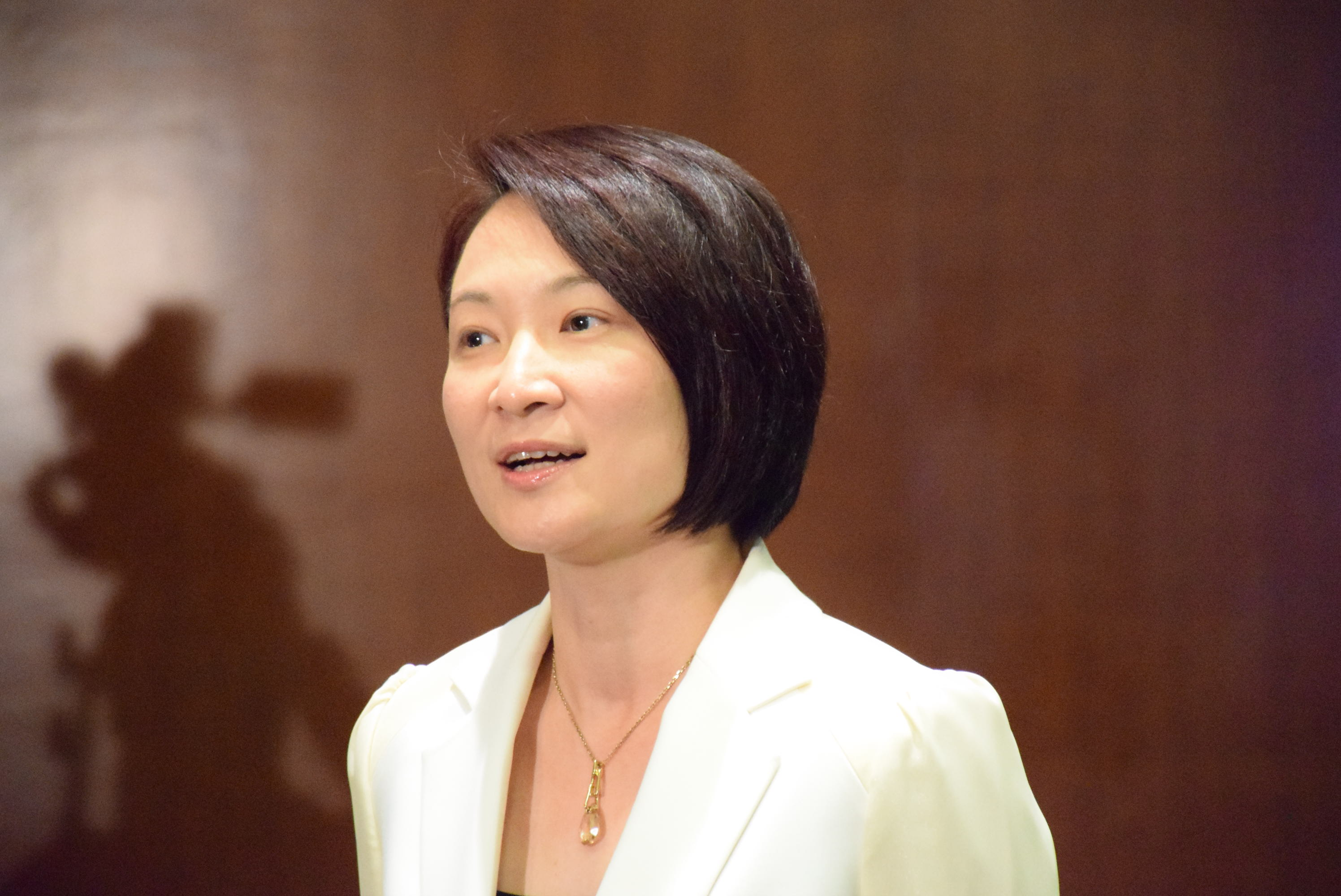 民建聯主席、立法會議員李慧琼 （美國之音記者湯惠芸拍攝）